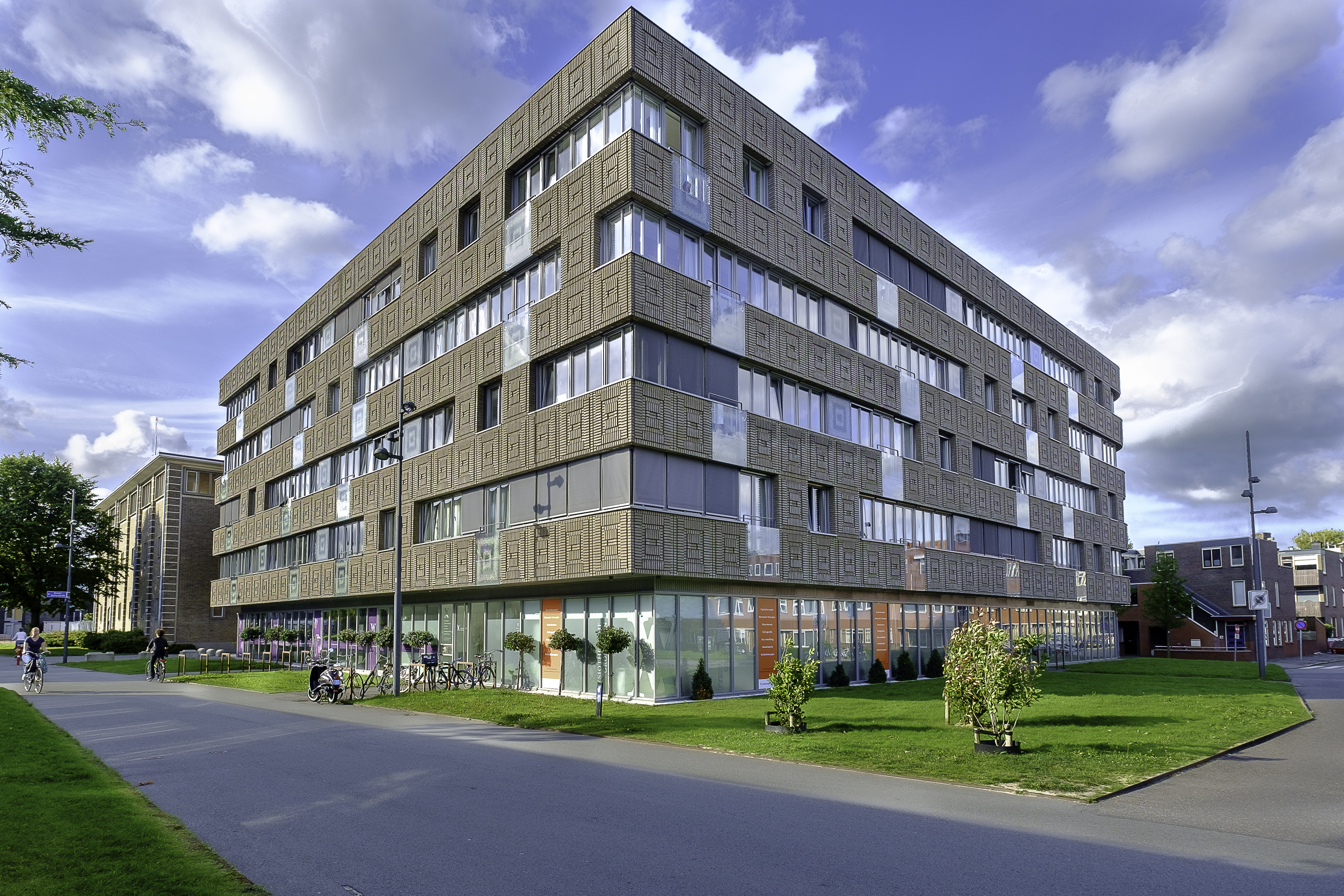 Gebouw Bloemhof in Groningen. In 2011 gebouwd naar ontwerp van architectenbureau Marlies Rohmer. Kwam voort uit de manifestatie de Intense Stad in 2004.